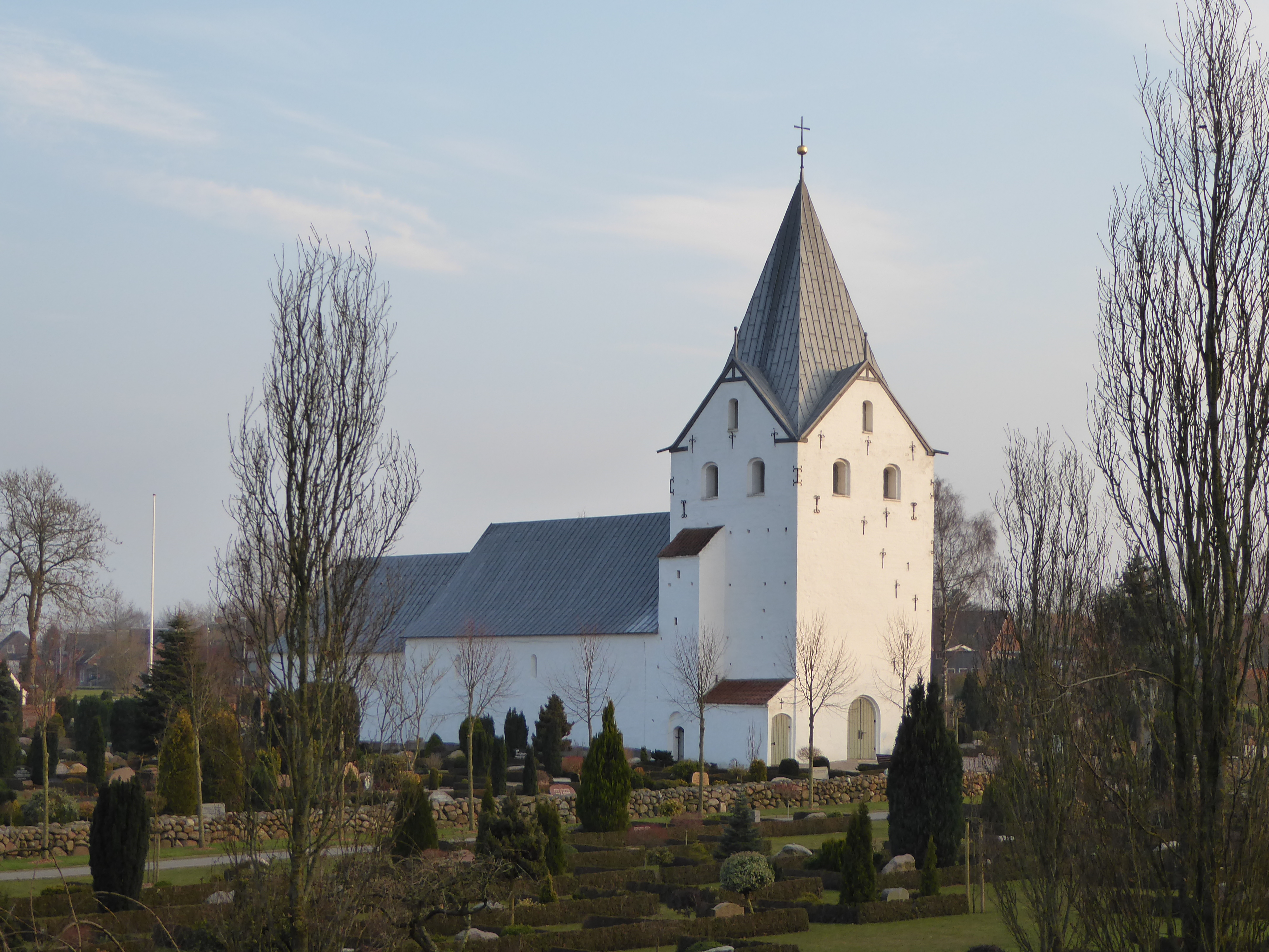 Gram Kirke